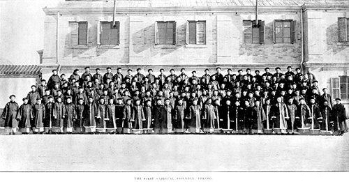 资政院于宣统二年九月初一（1910年10月3日）第一次举行开院礼时全体议员合影